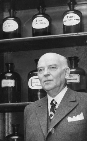 Wiljo Saaristo